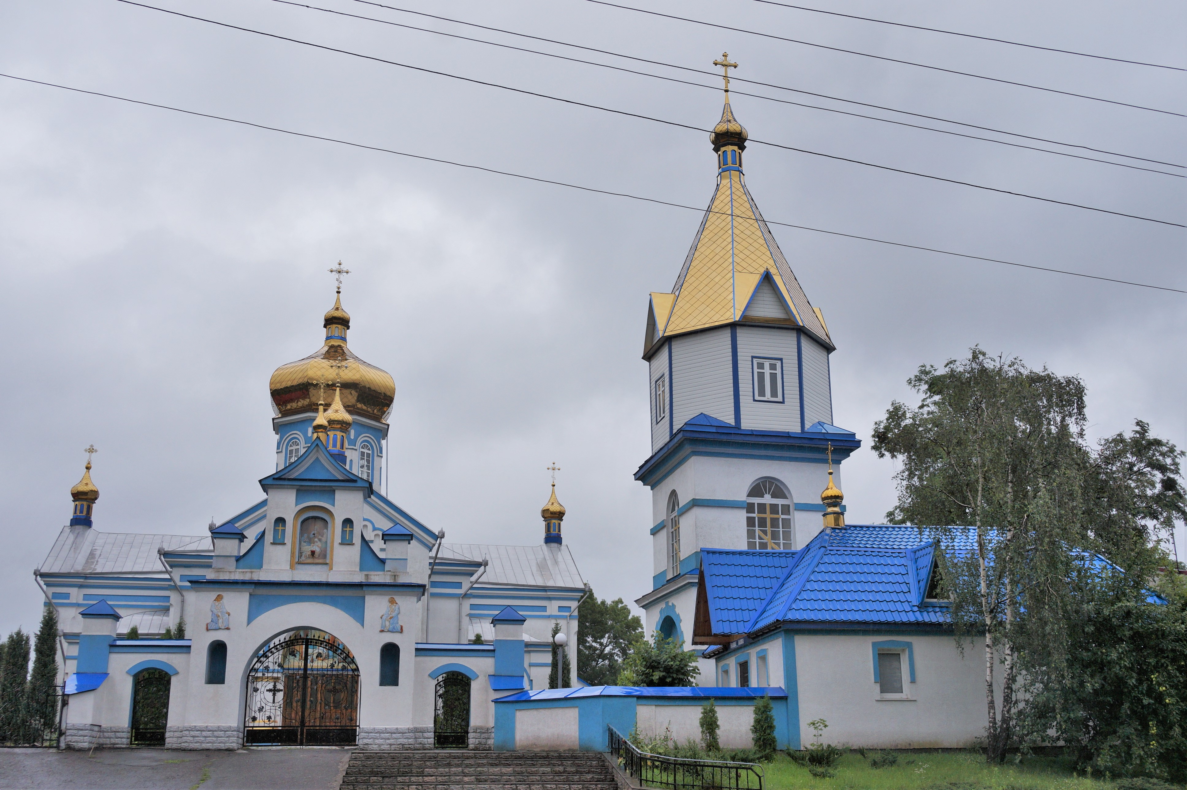 Комплекс споруд Різдво-Богородської церкви, Славута, вул. Церковна, 2